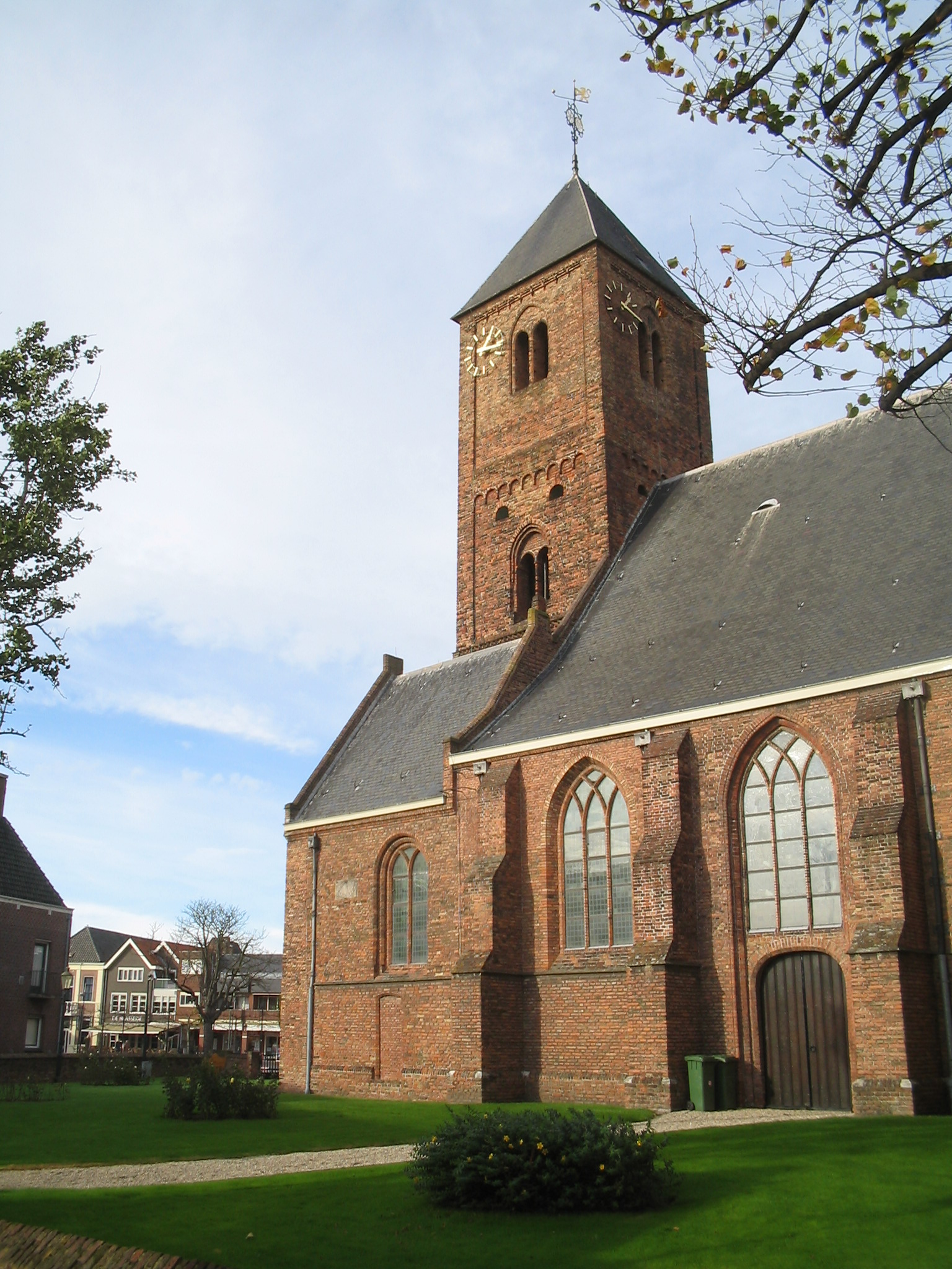 Naaldwijk, Grote kerk, 6 november 2005